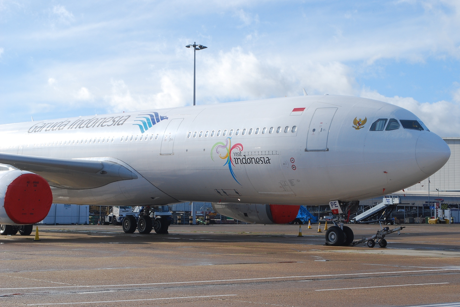 On State visit